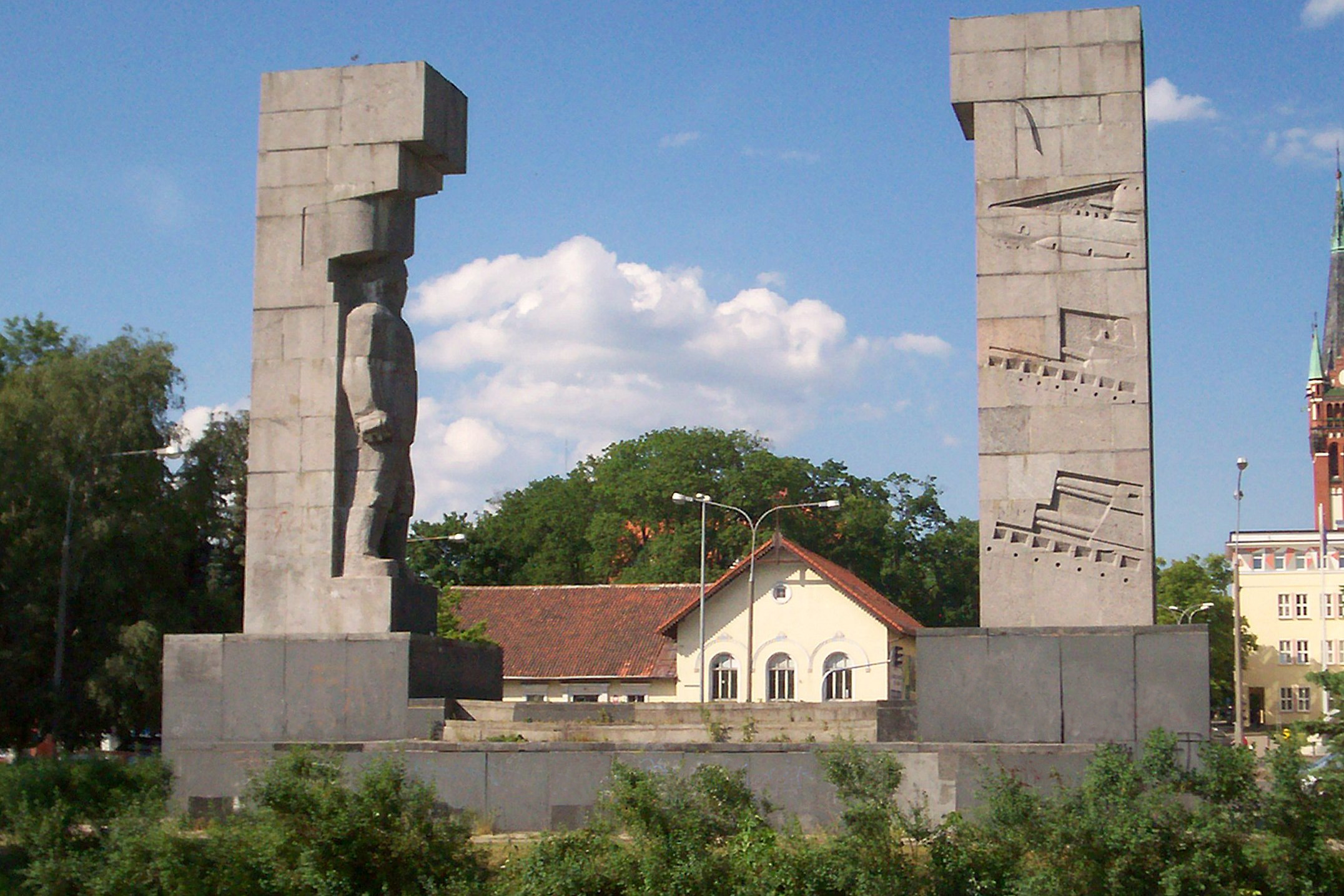 Pomnik Wyzwolenia Ziemi Warmińsko-Mazurskiej w Olsztynie (widok od tyłu)